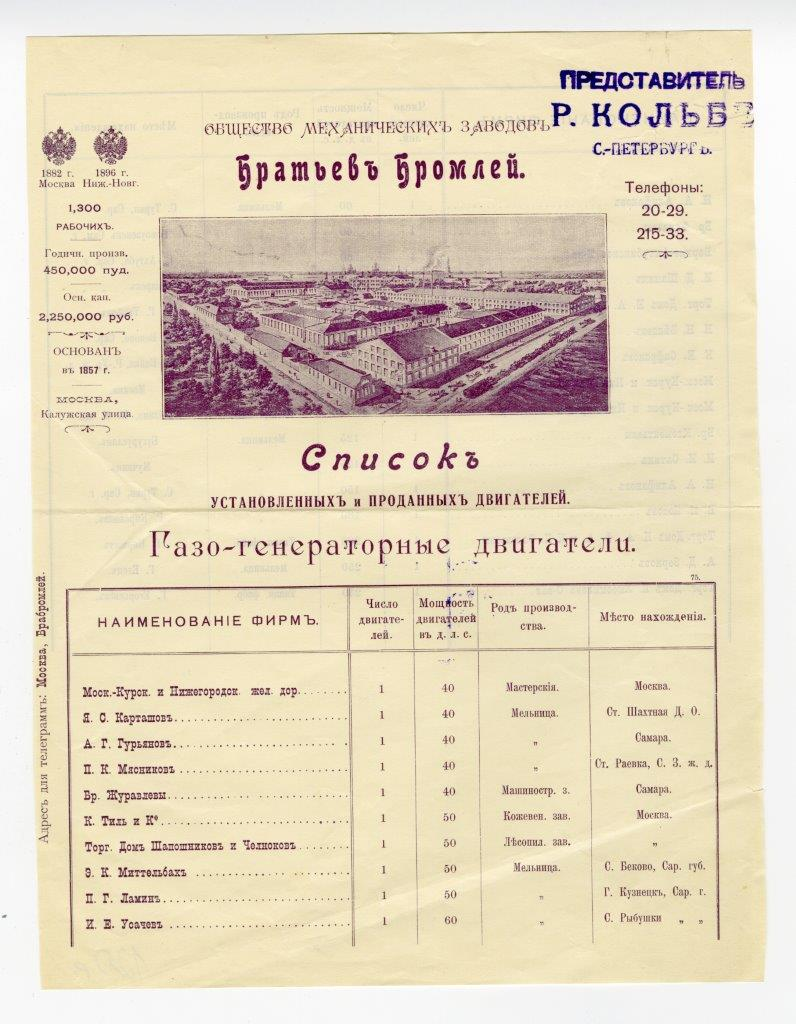 Рекламный листок Общества механических заводов братьев Бромлей с основным капиталом в 2,25 млн. руб. Москва, начало XX в.